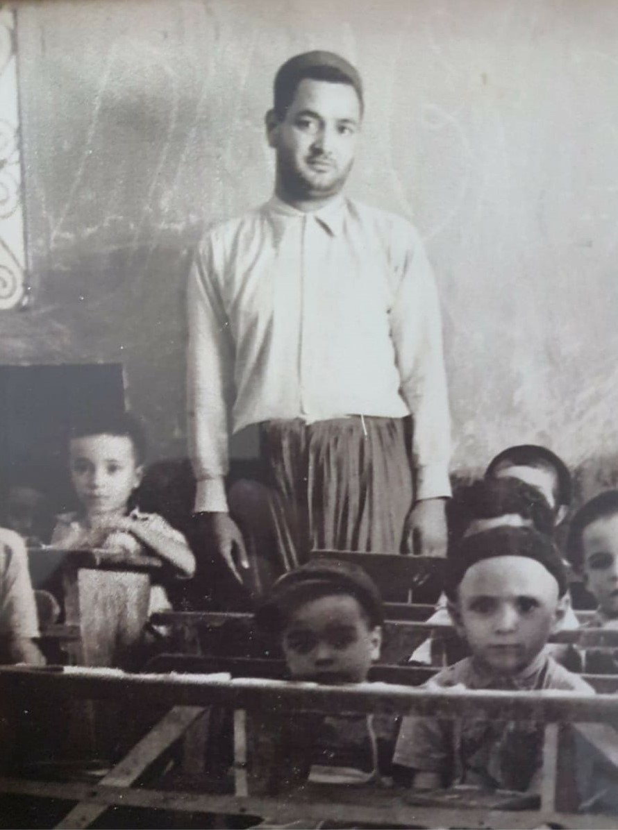 ילדים יהודיים יחד עם המלמד שלהם, ב"חדר" - בית הספר של אותם הימים